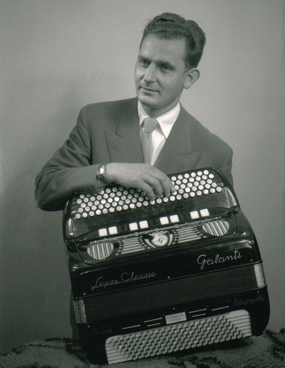 Addy Kleijngeld